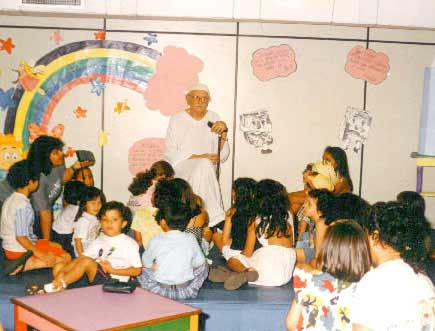 O escritor Jocelyn Brasil sendo entrevistado na Livriazinha Jinkings em 1998